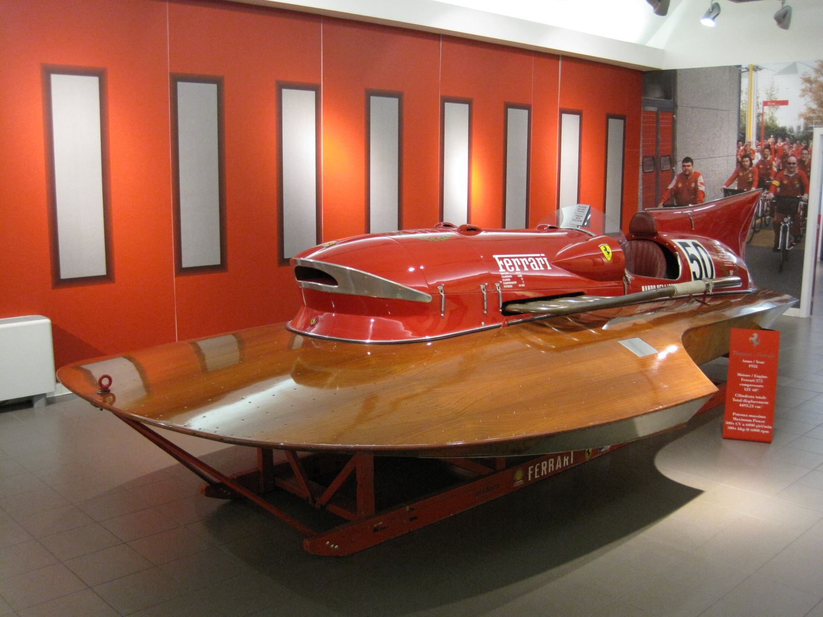 Collections of the Galleria Ferrari - Timossi Ferrari 1953 - Moteur V12 de Ferrari 375